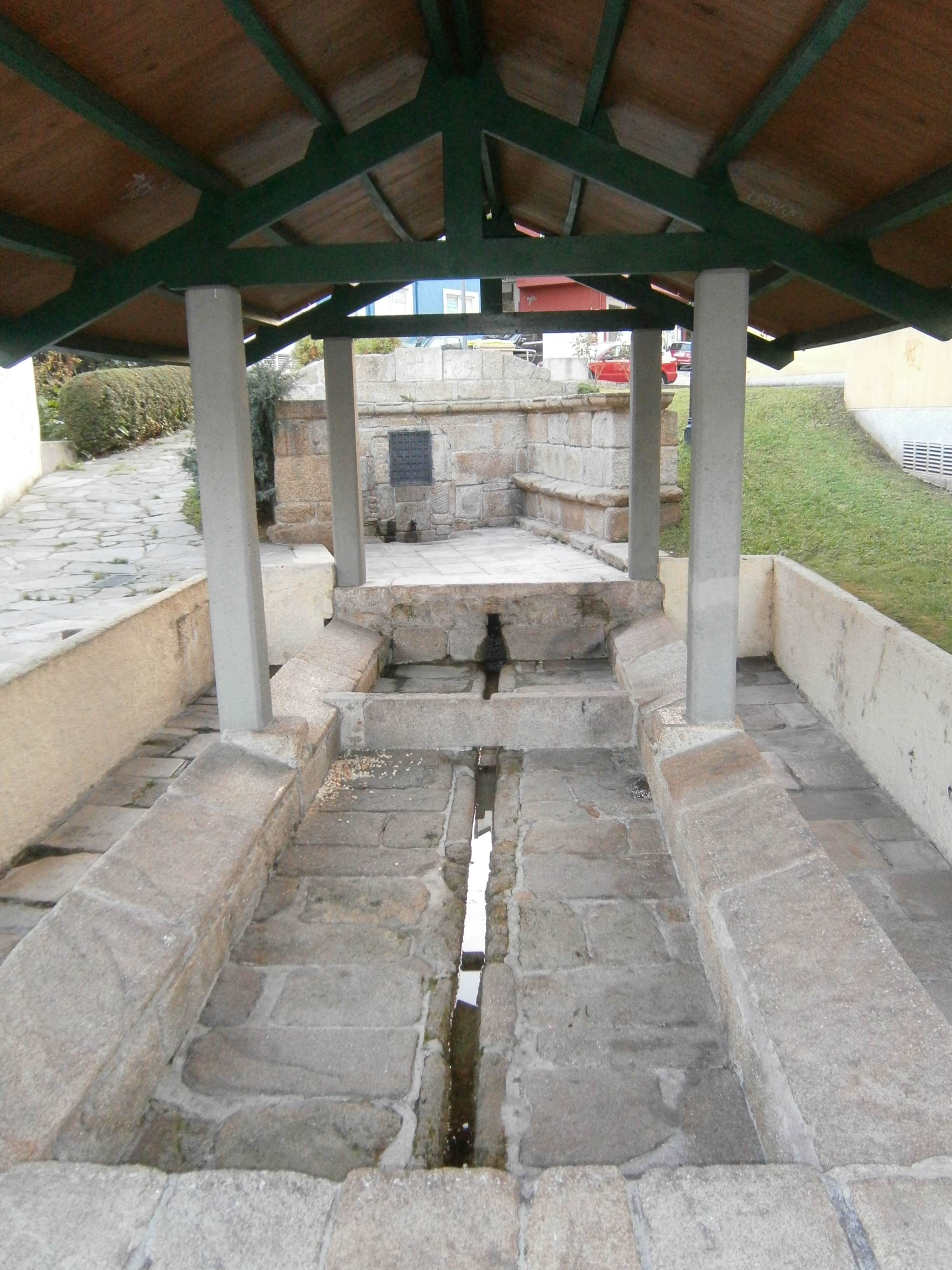 Fonte e lavadoiro en Palavea, A Coruña